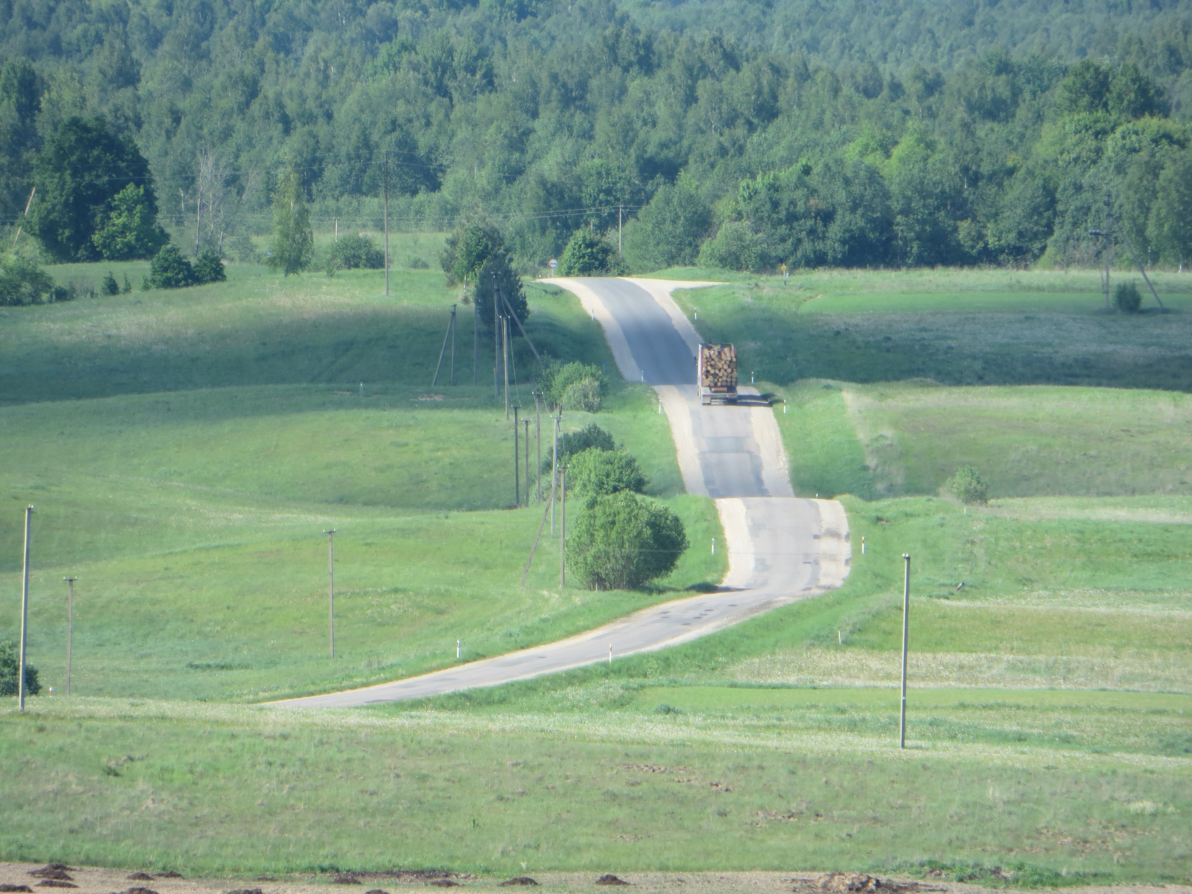 Inturkės sen., Lithuania